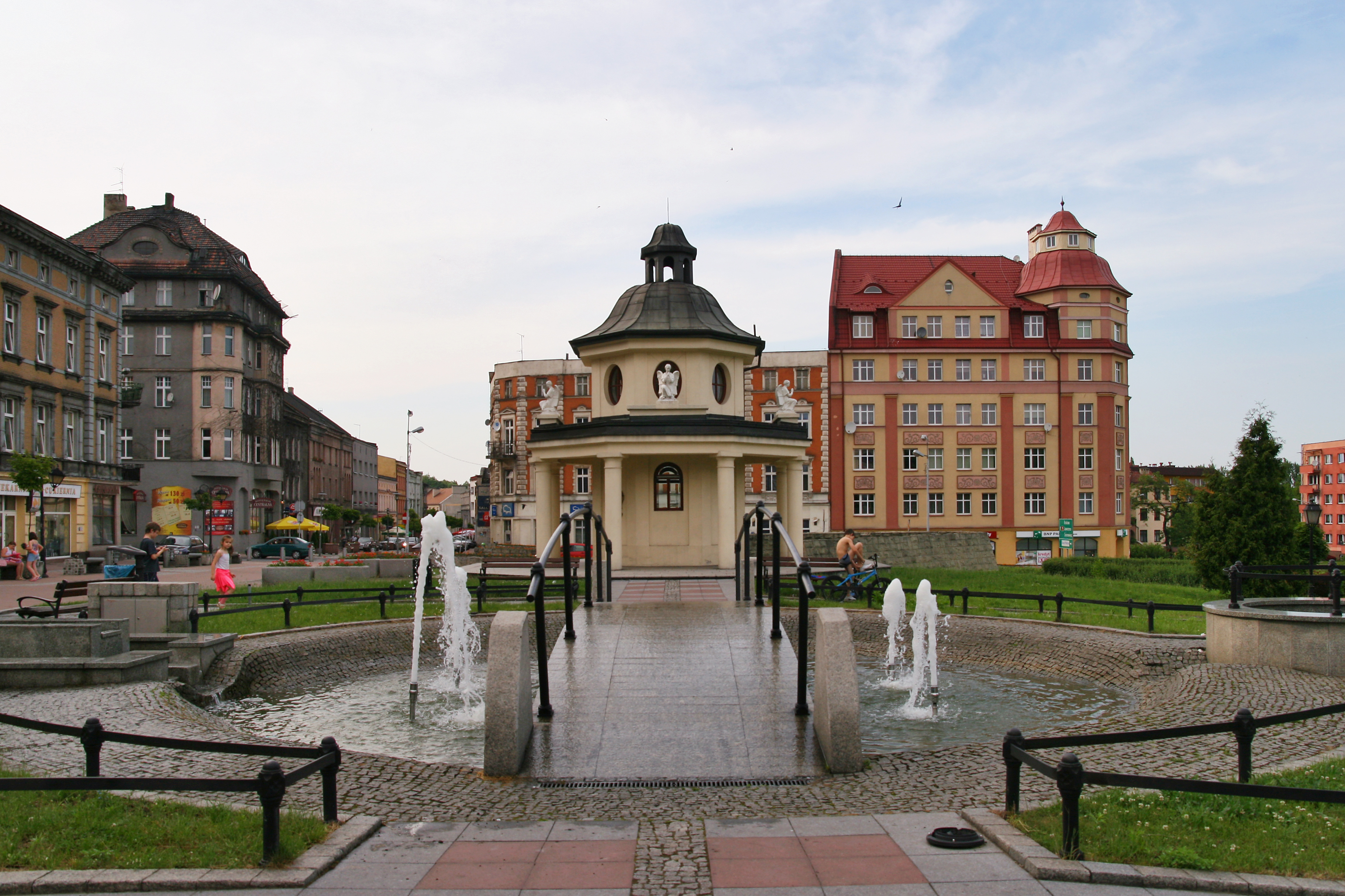 Kaplica Jarlików (z 1745 r.) w Mysłowicach.